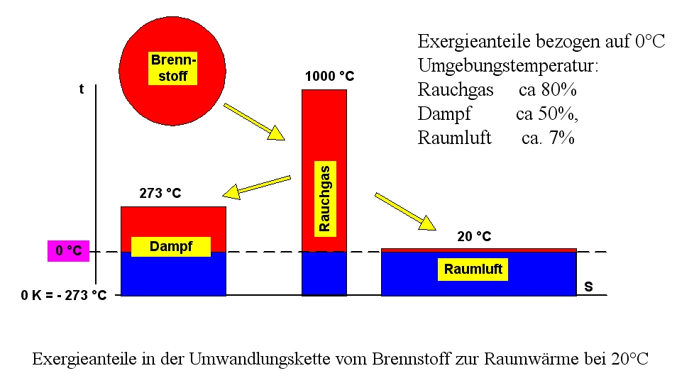 Exergie vom Brennstoff zur Raumwärme